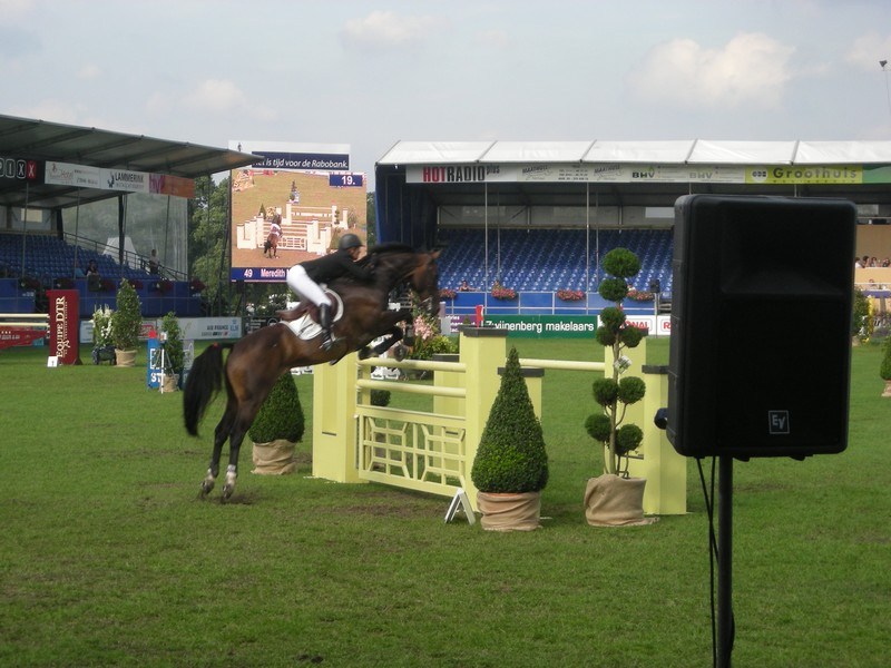 Meredith Michaels-Beerbaum auf Checkmate (Hannoveraner Wallach)